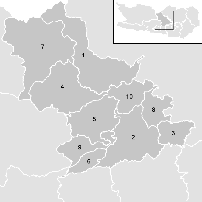 Leere Karte mit den Gemeinden im Österreichischen Bezirk Feldkirchen